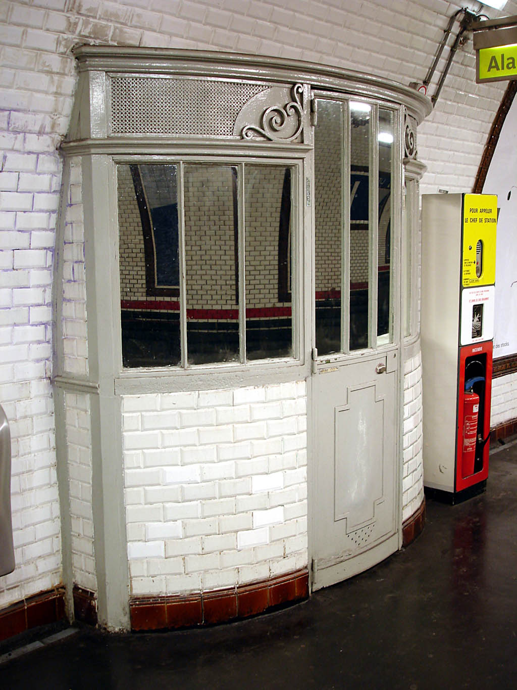 Station Liège, de la ligne 13 du métro de Paris, France.